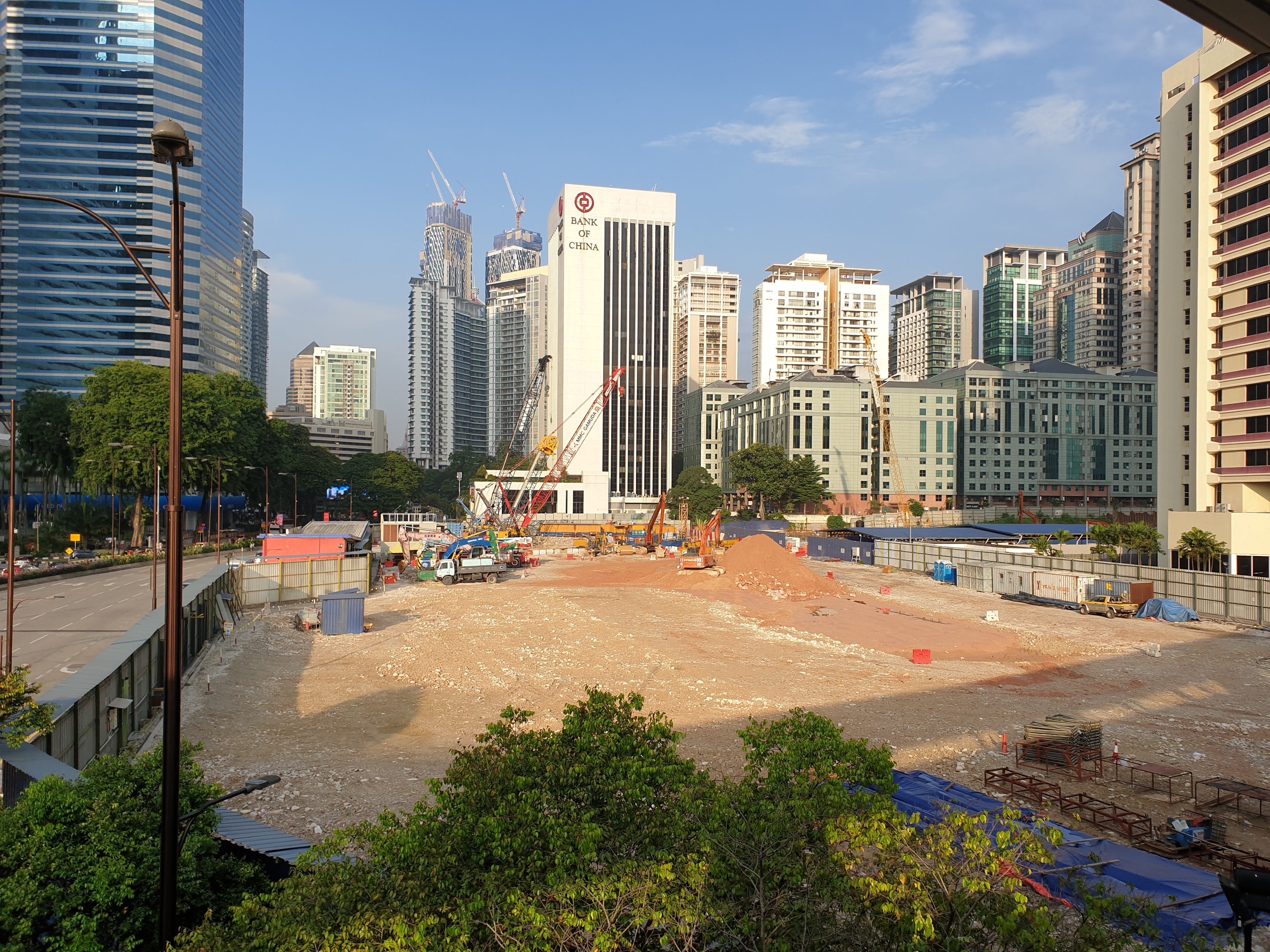 Ampang Park SSP Line